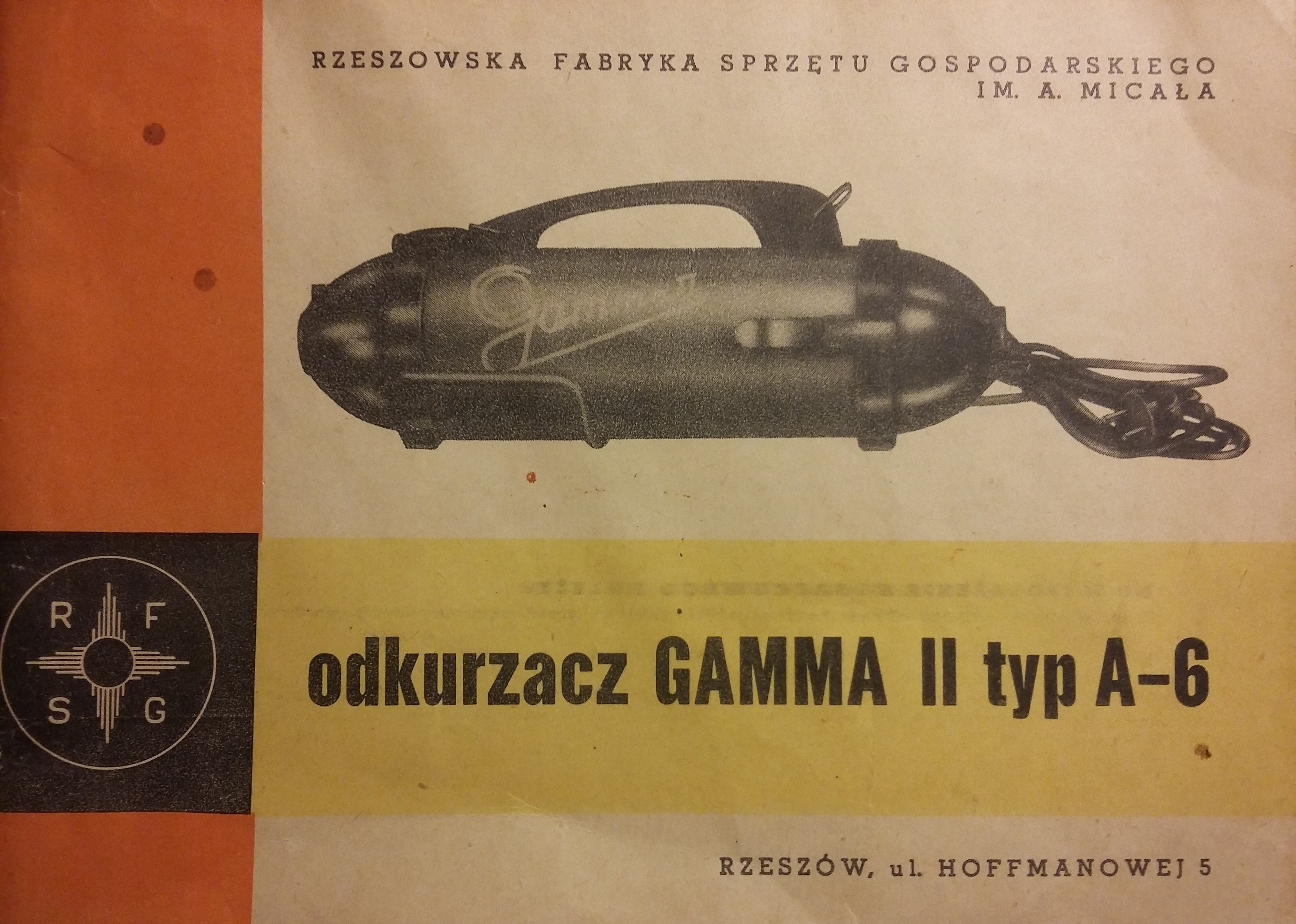 Okładka instrukcji odkurzacza Gamma II